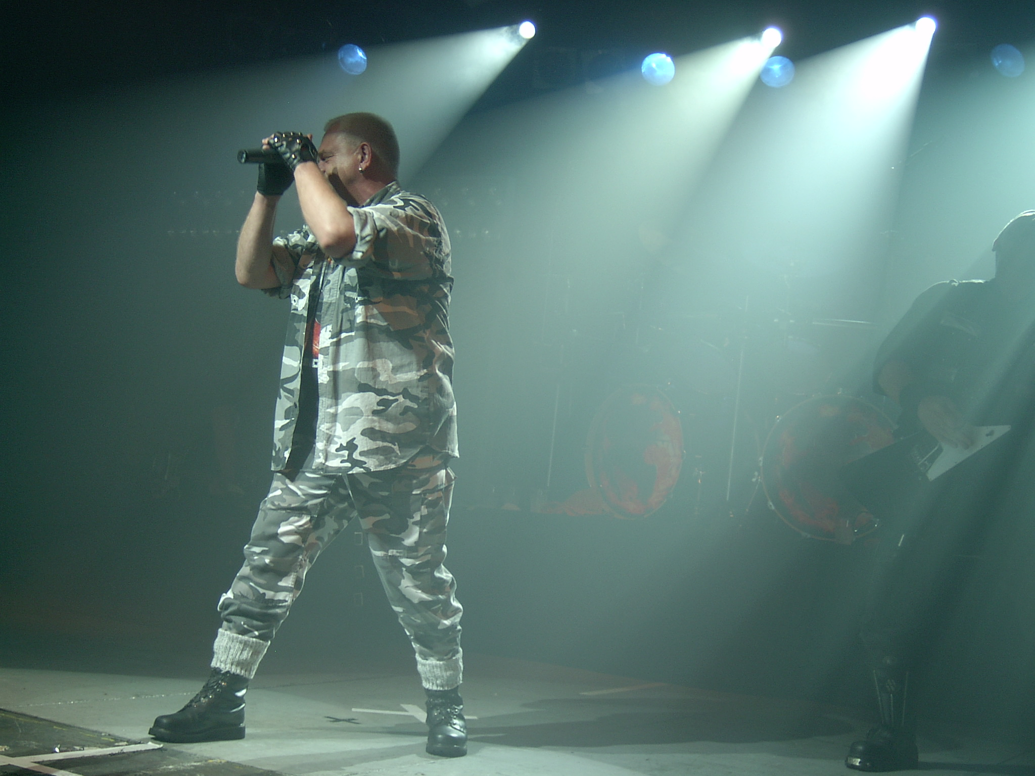 U.D.O. live in Nürnberg/Hirsch